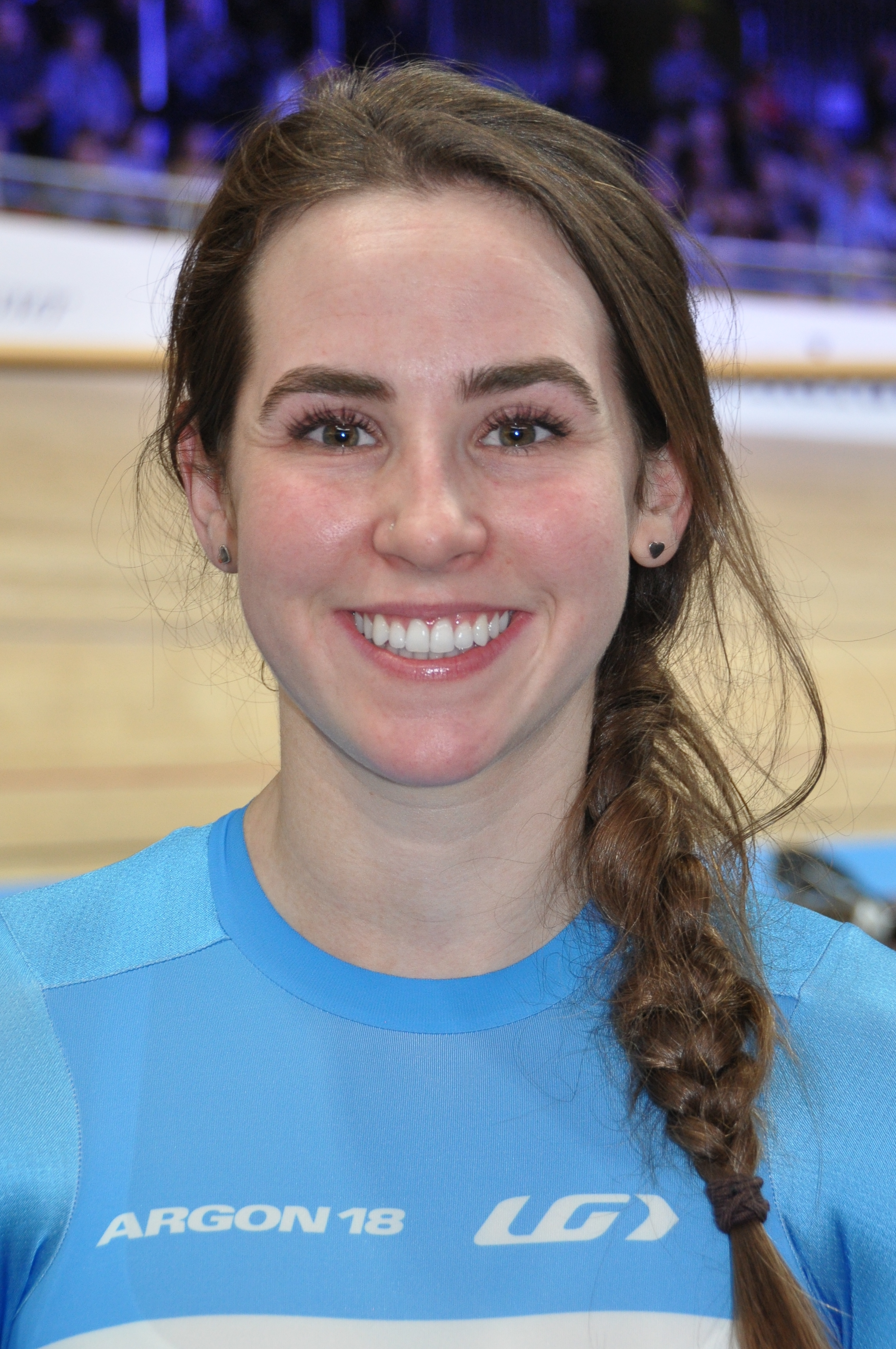 Sarah Orban, kanadische Radsportlerin